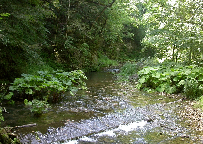 Wutachschlucht, Schwarzwald, Deutschland, Germany